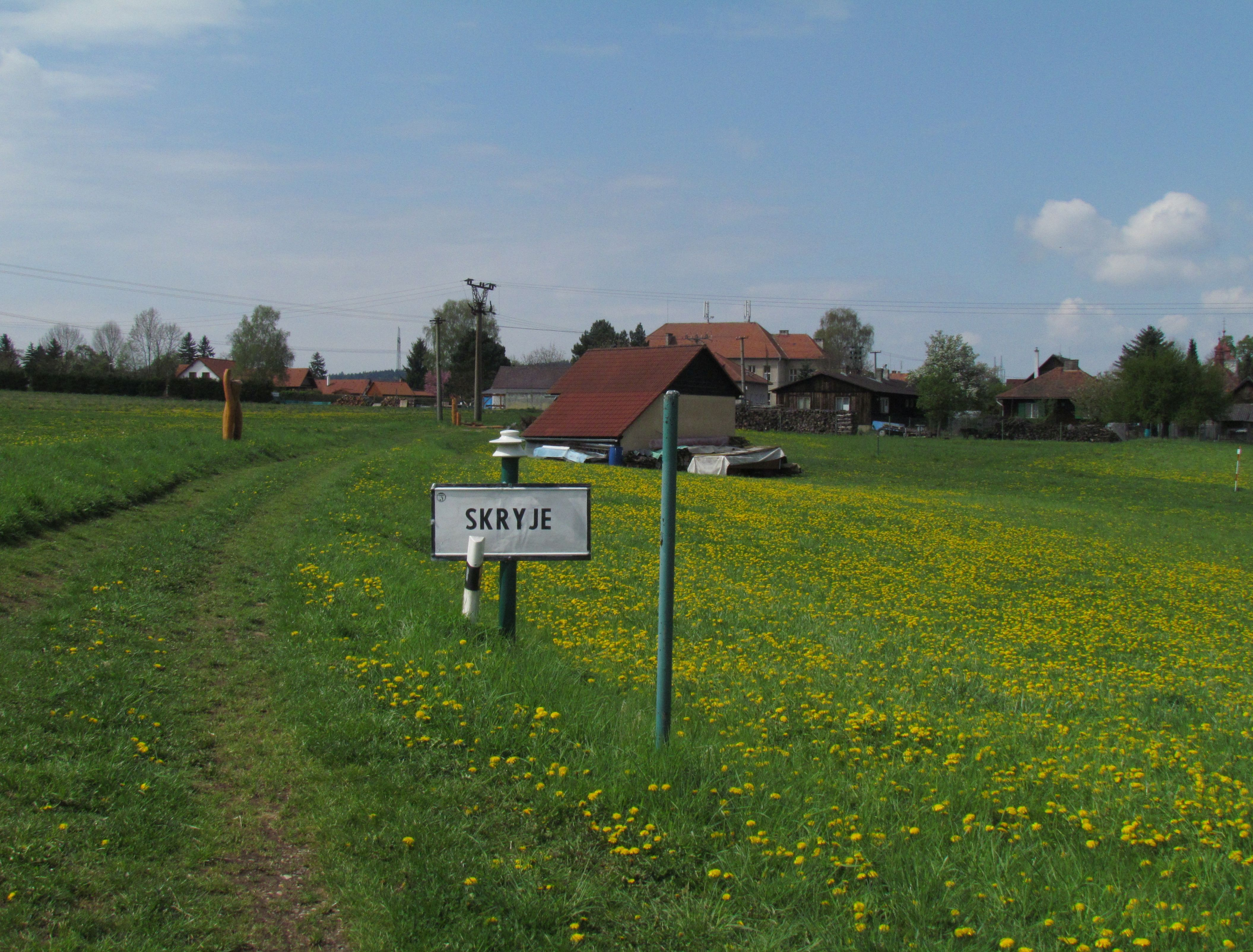 Naučná stezka Po stopách trilobita u obce Skryje nad Berounkou. Pohled ze stezky k obci.